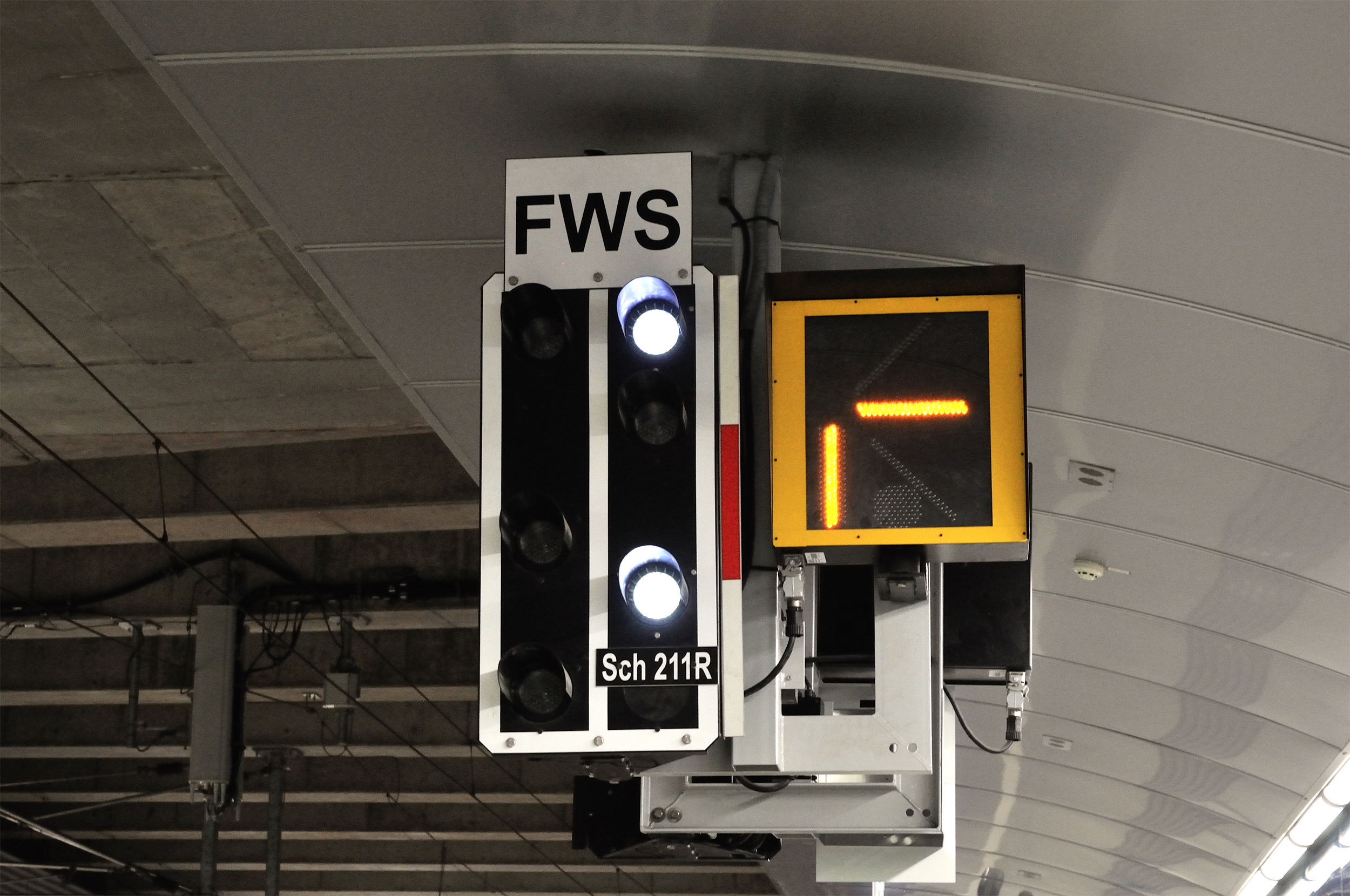 Schutzsignal 211R samt Signalnachahmer E1N (Zwischensignal E1) am Bahnhof Flughafen Wien Schwechat.